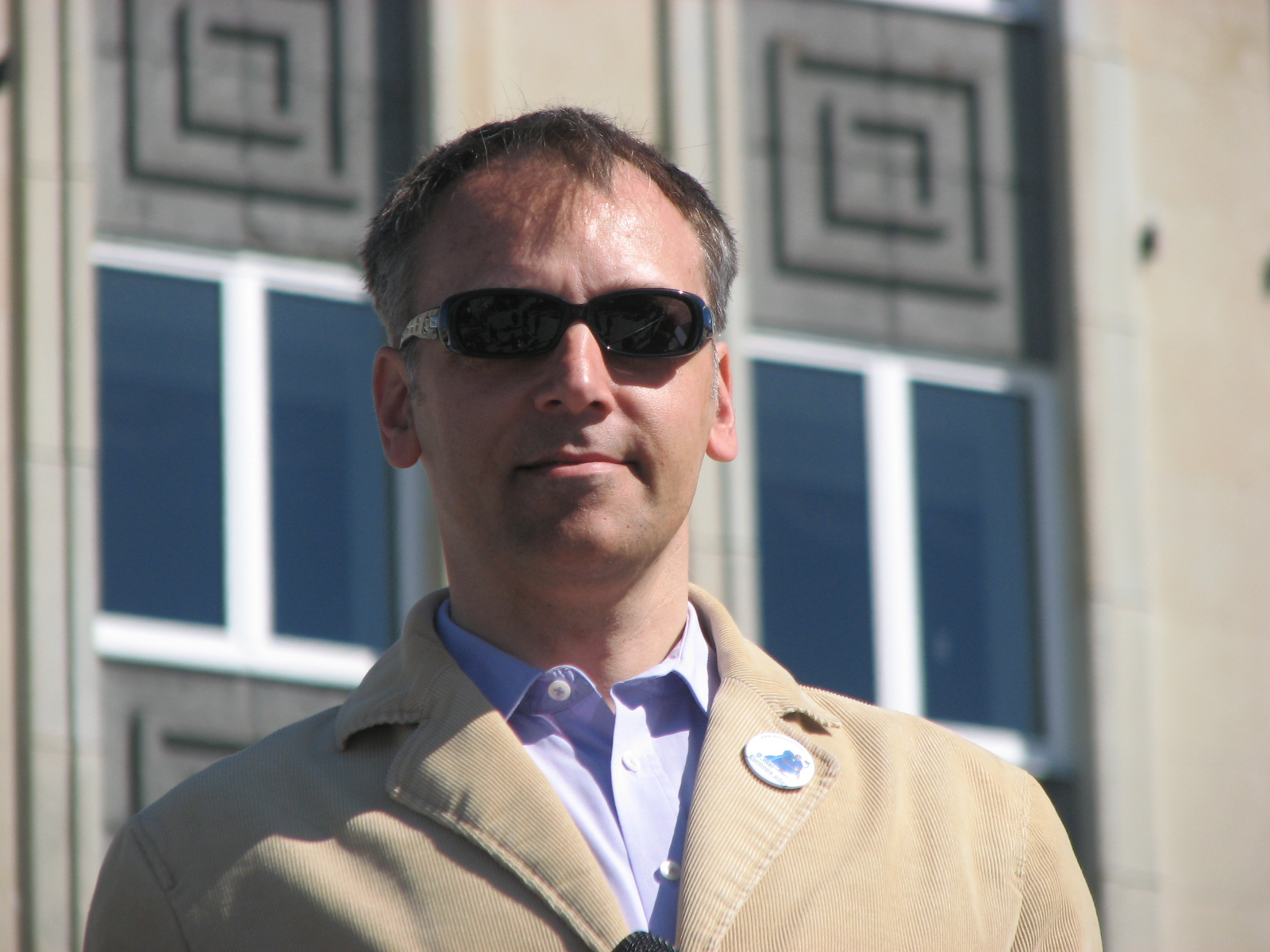 Tauri Tallermaa esinemas Euroopa päeva tähistamisel Vabaduse väljakul